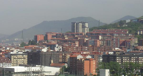 Zorrotzako auzoa, Barakaldotik ikusia.